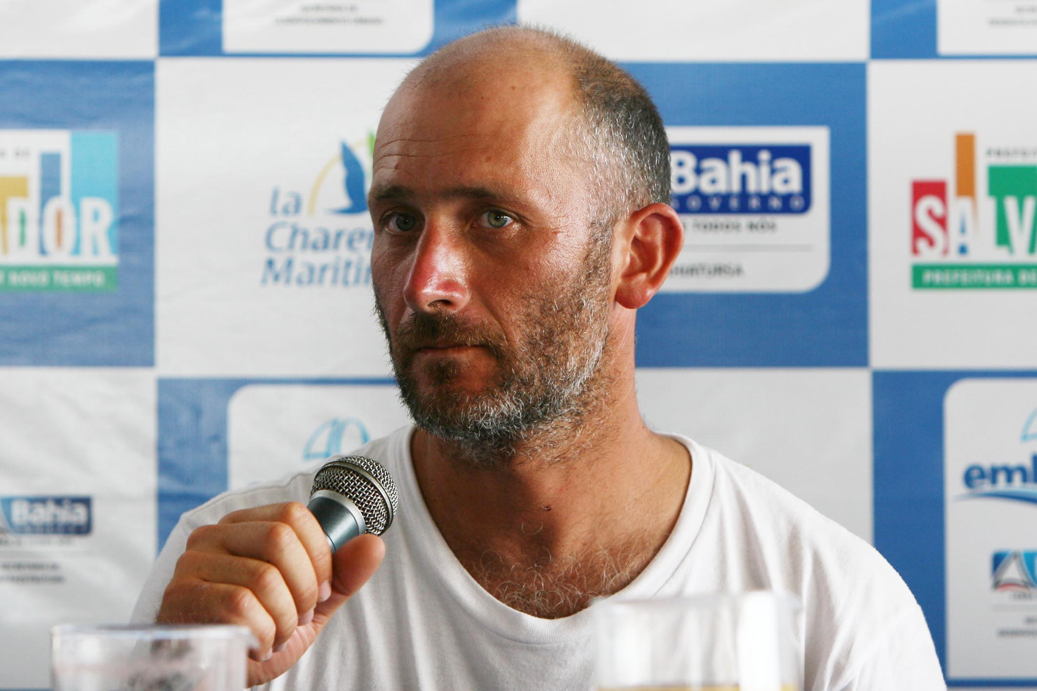 Coletiva sobre a regata La Charente-Maritime Bahia 2011. Na Foto: David Raison, 1º Lugar. Foto: Adenilson Nunes/Secom. Local: Terminal Náutico - Mercado Modelo.